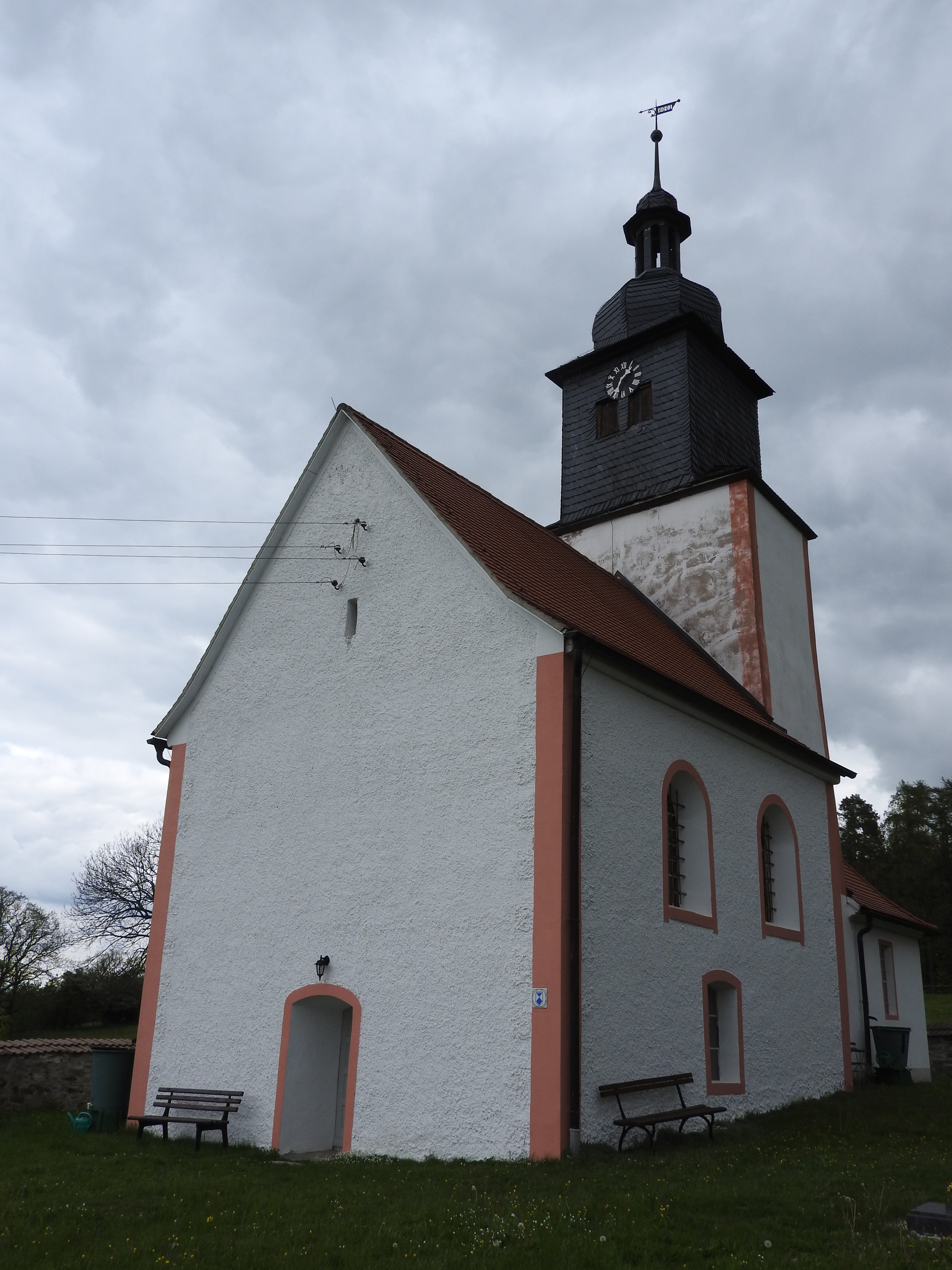 Kirche in Traun, Schmieritz, Thüringen